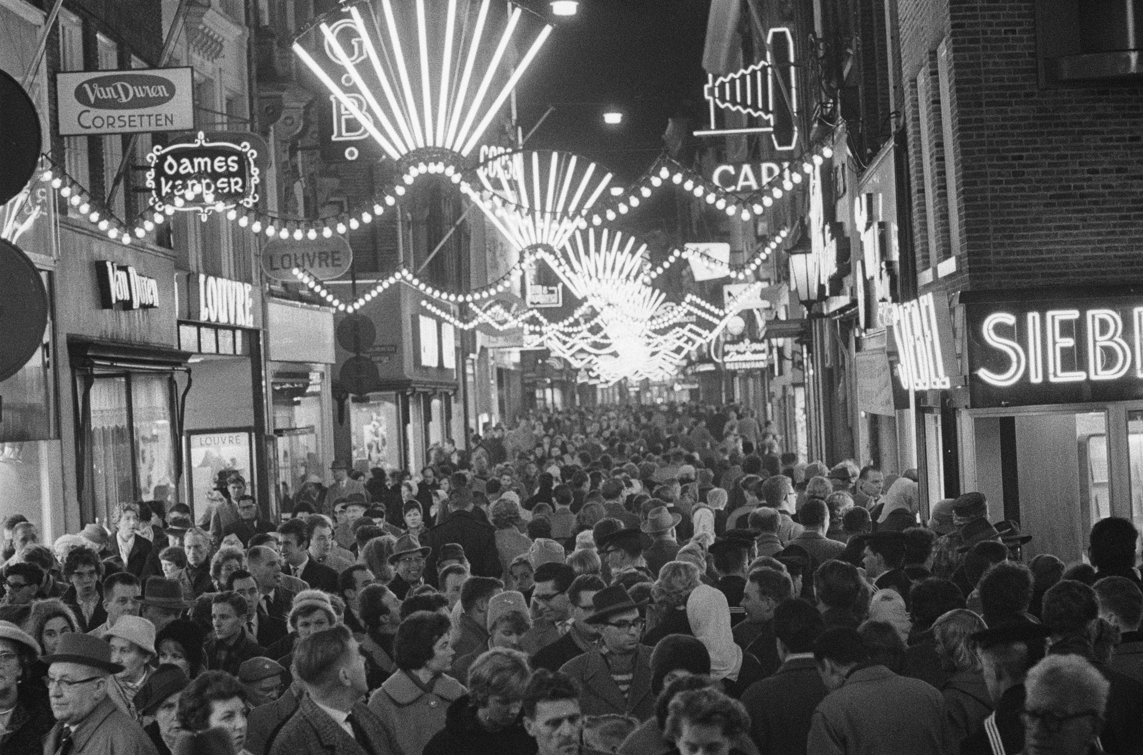 Collectie / Archief : Fotocollectie Anefo Reportage / Serie : [ onbekend ] Beschrijving : Enorme drukte in de Kalverstraat t.g.v. de koopavonden voor St. Nicolaas Datum : 2 december 1960 Locatie : Amsterdam, Noord-Holland Trefwoorden : KOOPAVONDEN, druktes Persoonsnaam : Sinterklaas Fotograaf : Pot, Harry / Anefo Auteursrechthebbende : Nationaal Archief Materiaalsoort : Negatief (zwart/wit) Nummer archiefinventaris : bekijk toegang 2.24.01.05 Bestanddeelnummer : 911-8368